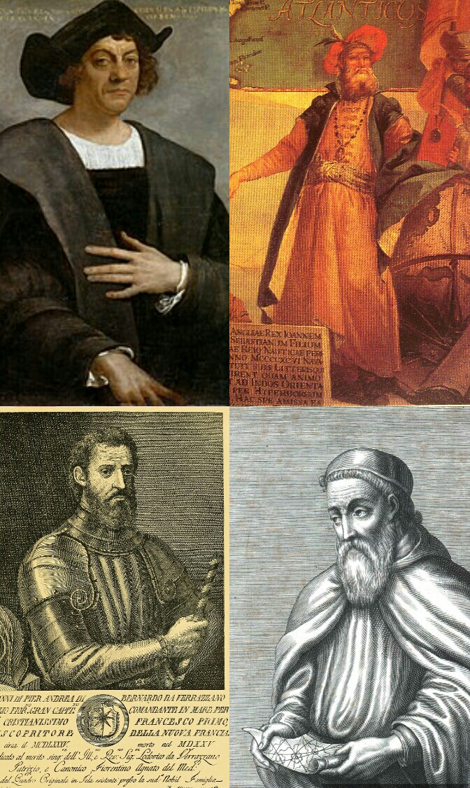 Some Italian navigators